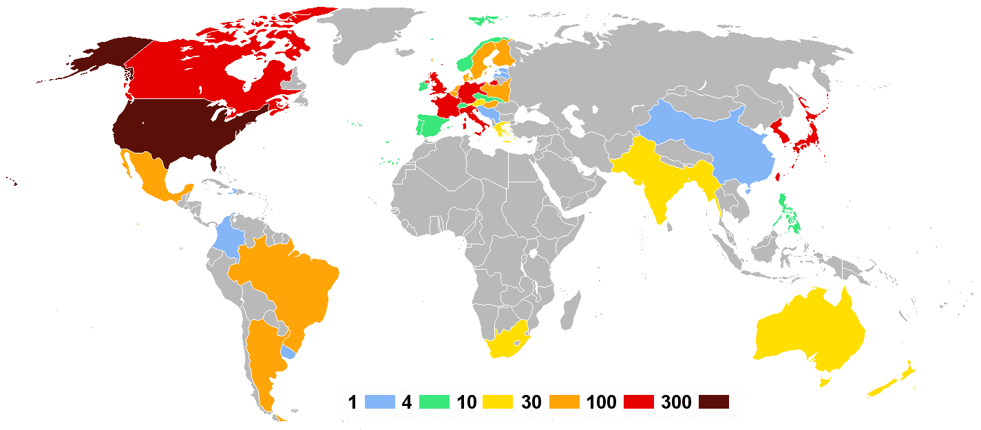 Olympische Sommerspiele 1932 — Anzahl der Athleten